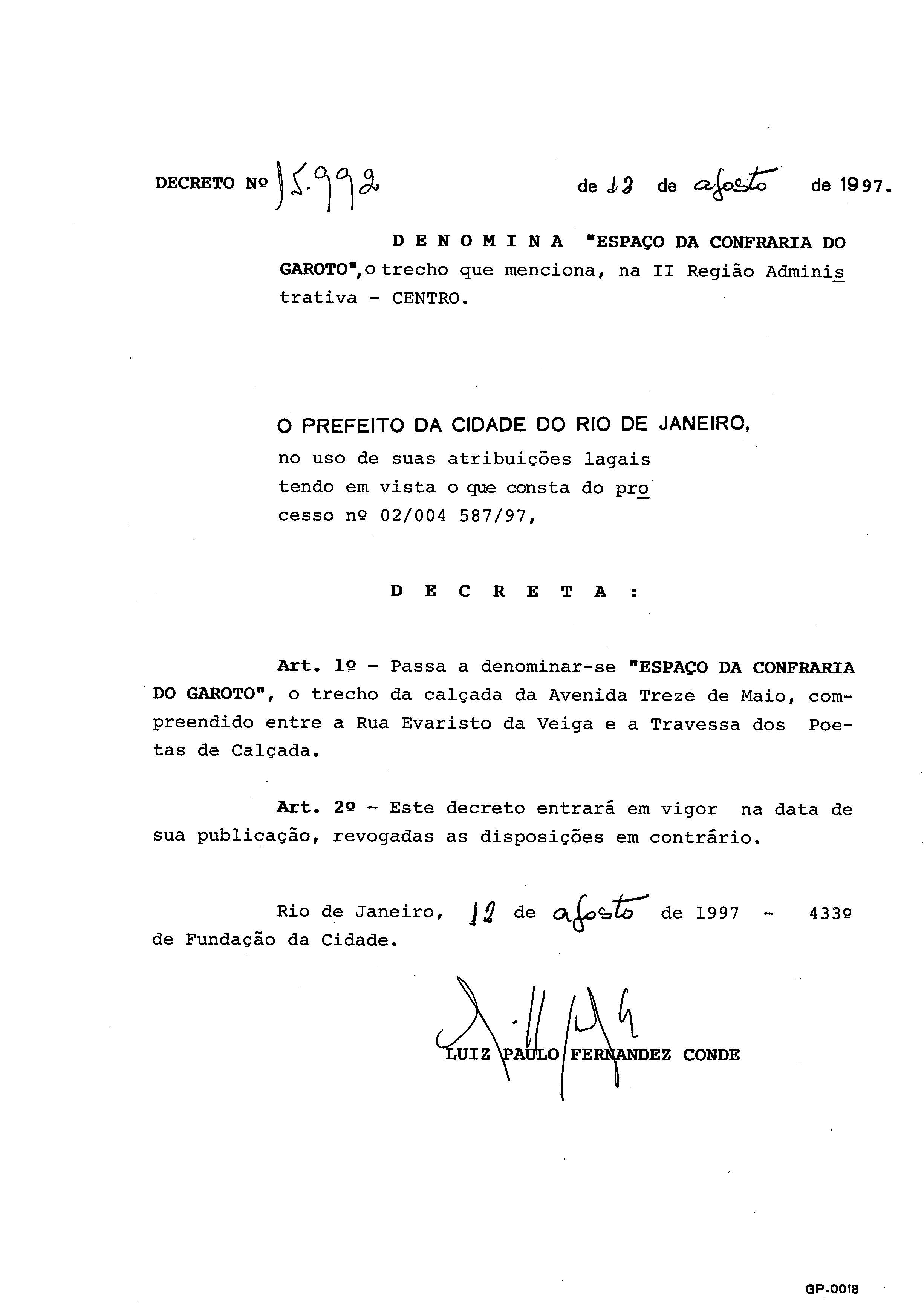 Decreto Municipal 15.992 de 12 de Agosto de 1997, da Cidade do Rio de Janeiro, Brasil. Reconhece a sede histórica da Confraria do Garoto, o ESPAÇO DA CONFRARIA DO GAROTO, situado no “trecho da calçada da Avenida Treze de Maio, entre a Rua Evaristo da Veiga e a Travessa dos Poetas de Calçada”.